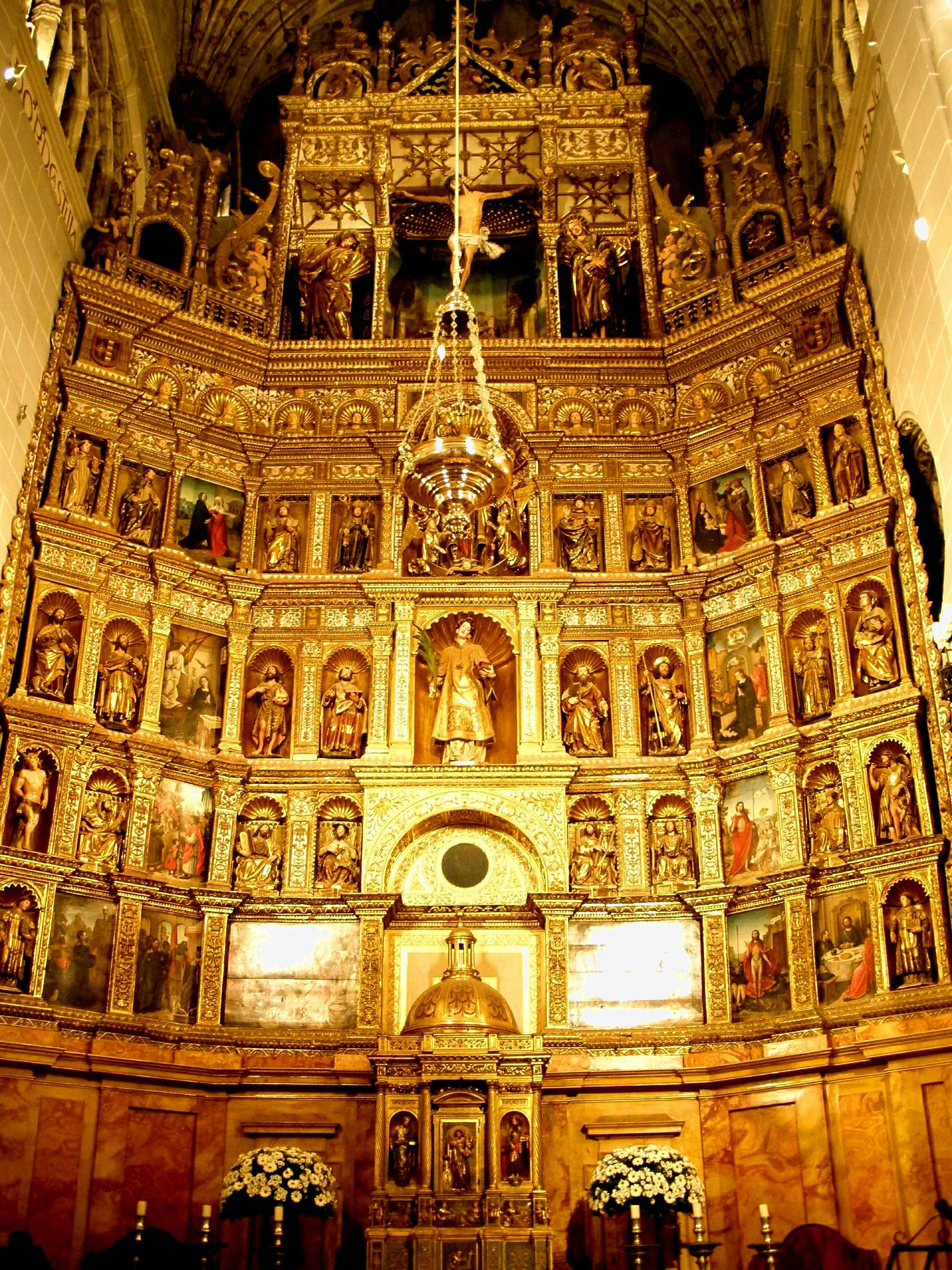 Retablo mayor de la Catedral de Palencia (Castilla y León)